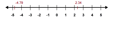 വാസ്തവികസംഖ്യാരേഖ